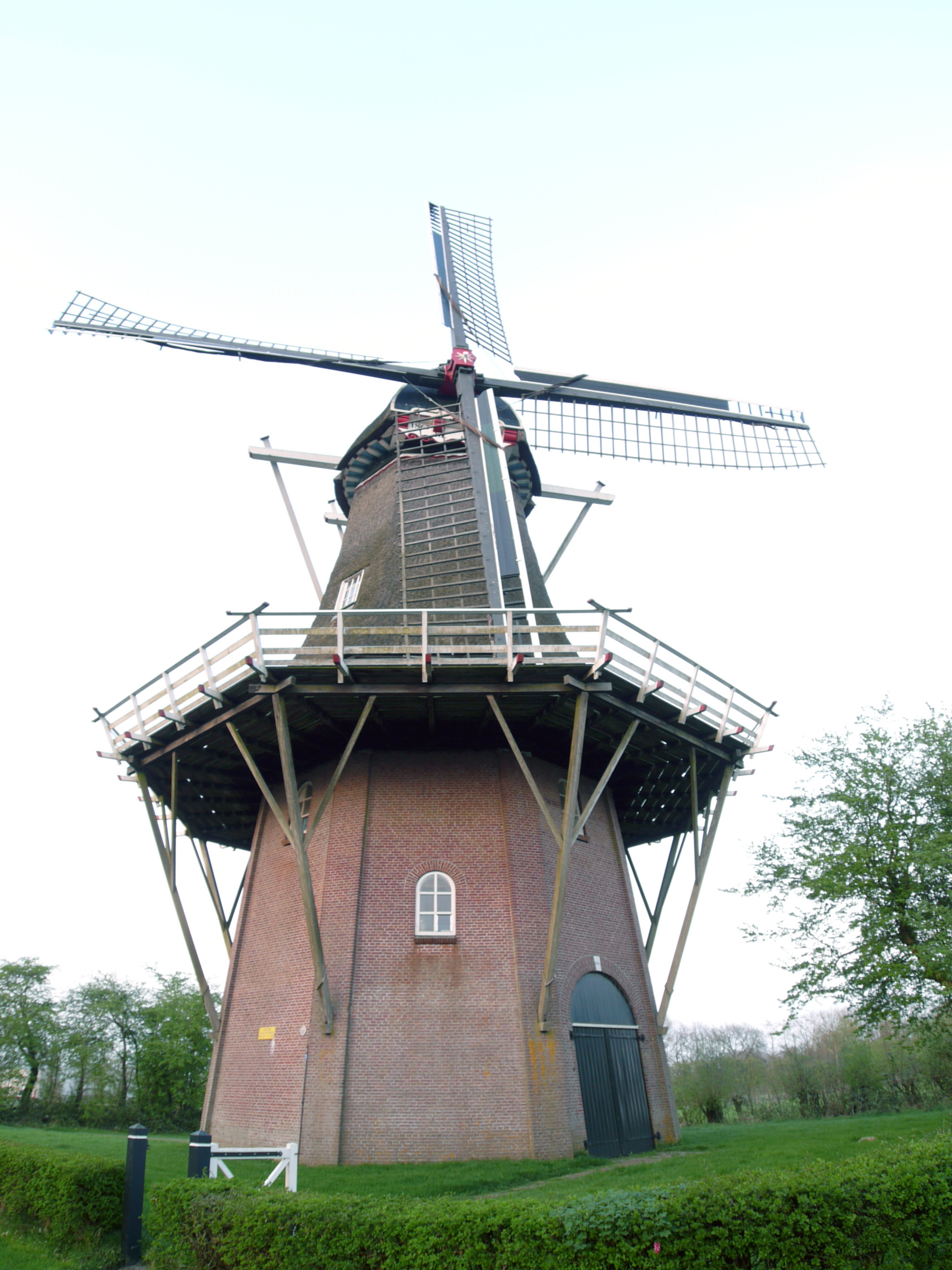 Molen De Hoop in Sumar